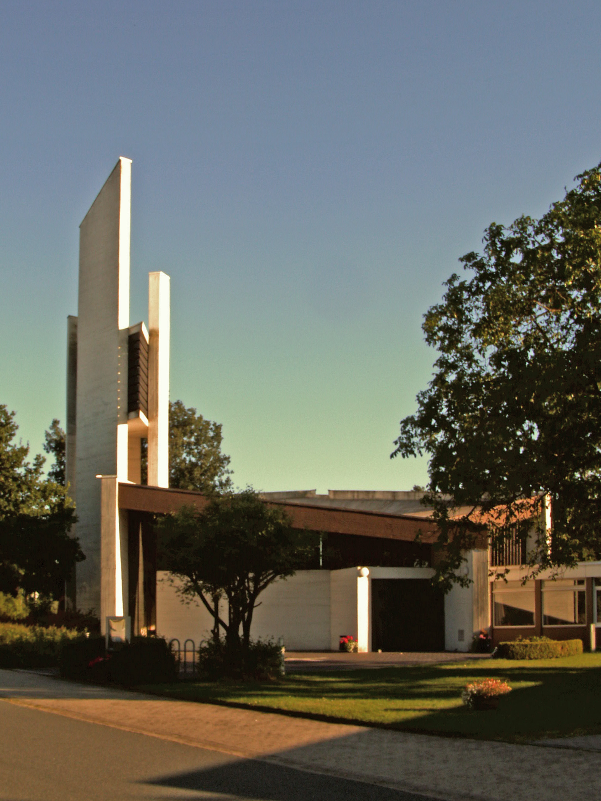 Evangelisch-lutherische St.-Markus-Kirche in Reislingen, Ortsteil von Wolfsburg